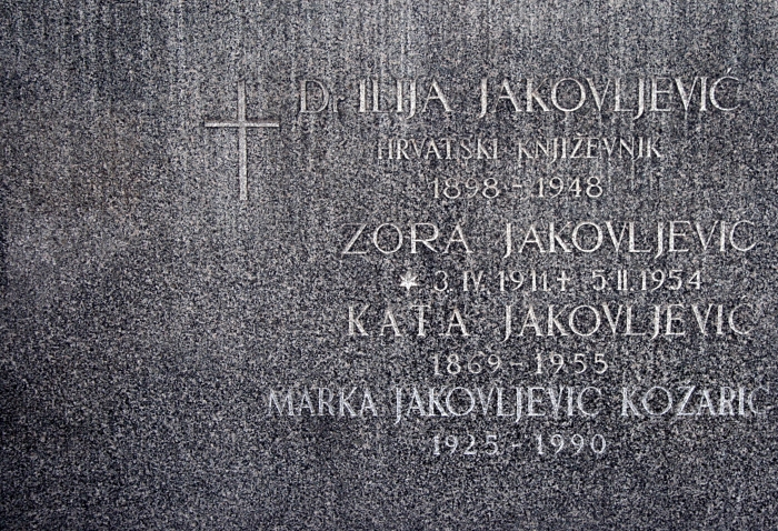 grob Ilije Jakovljevića na Mirogoju u Zagrebu